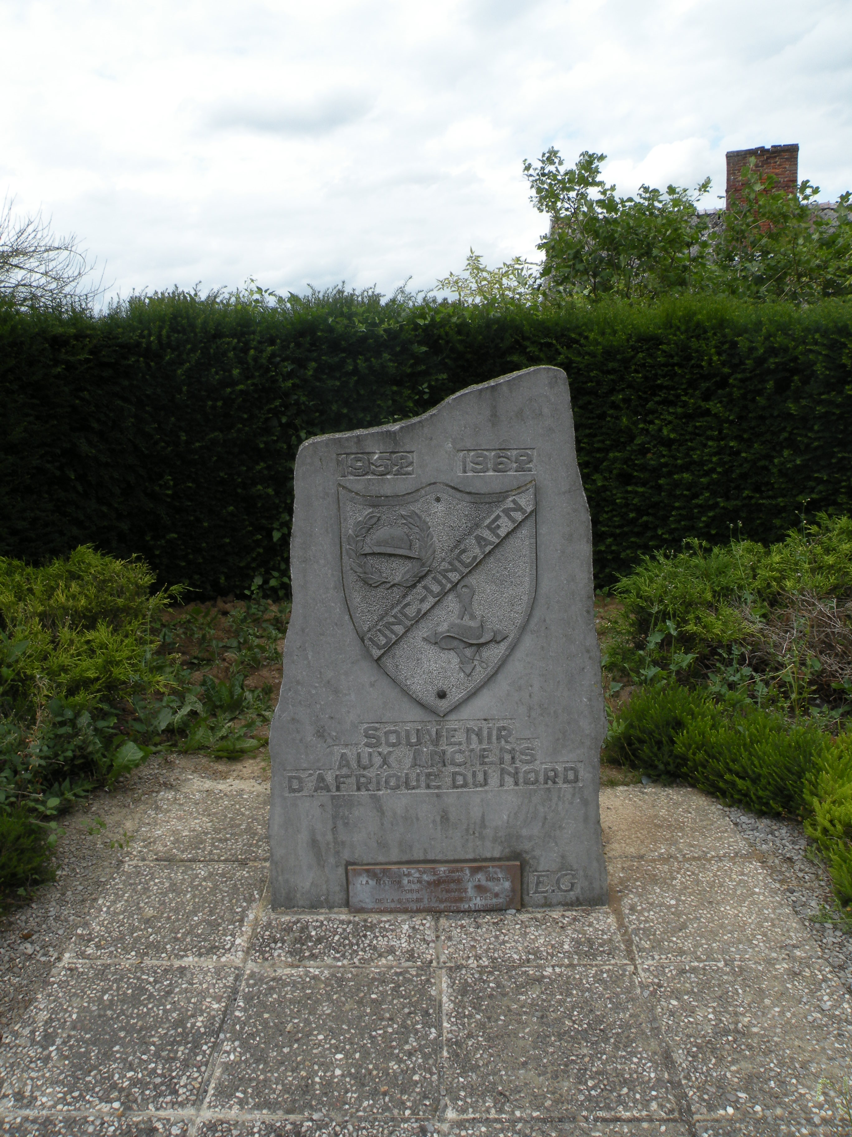 moument au morts d'Étrœungt